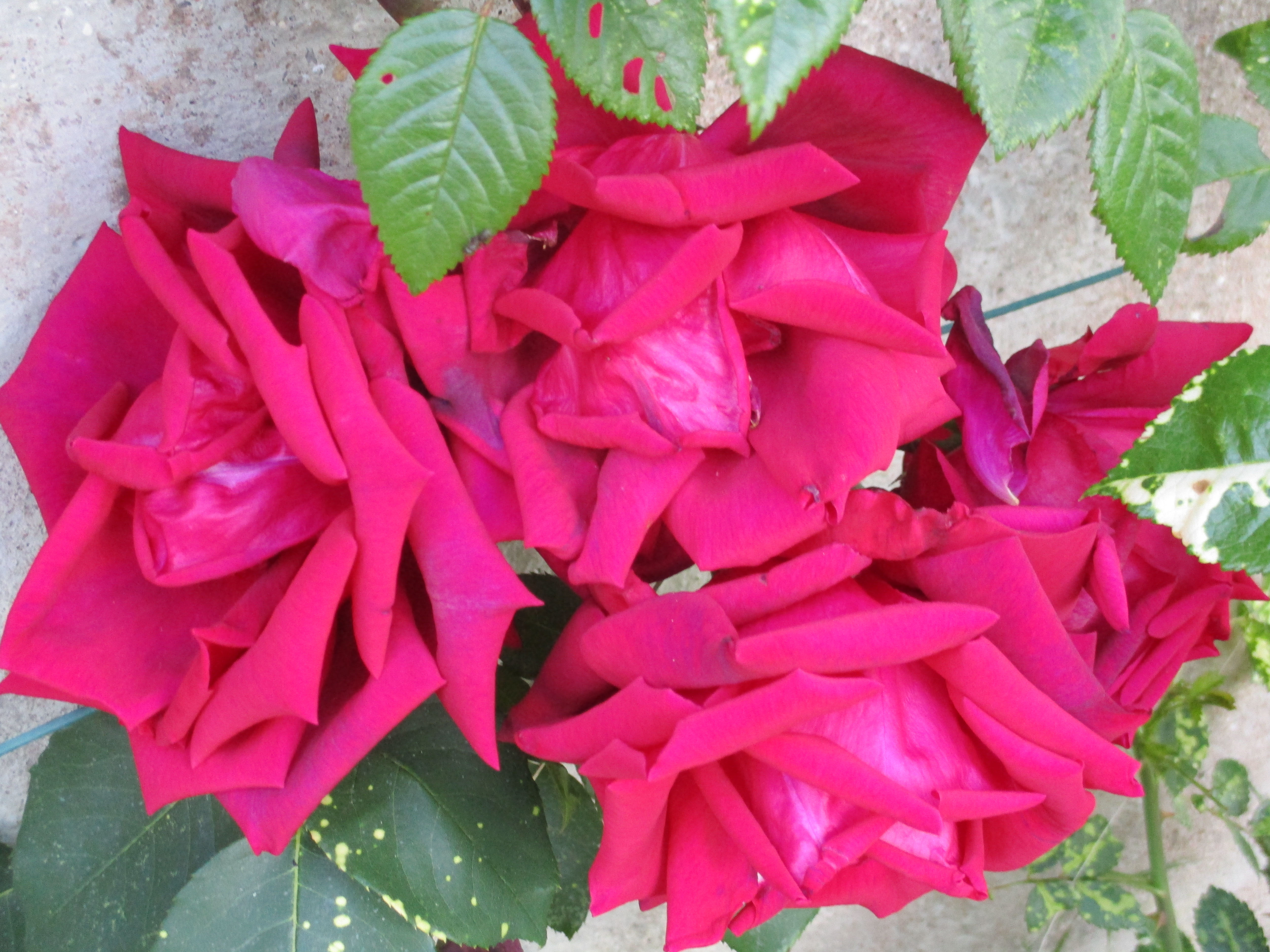 Rose 'Ena Harkness' fin mai.